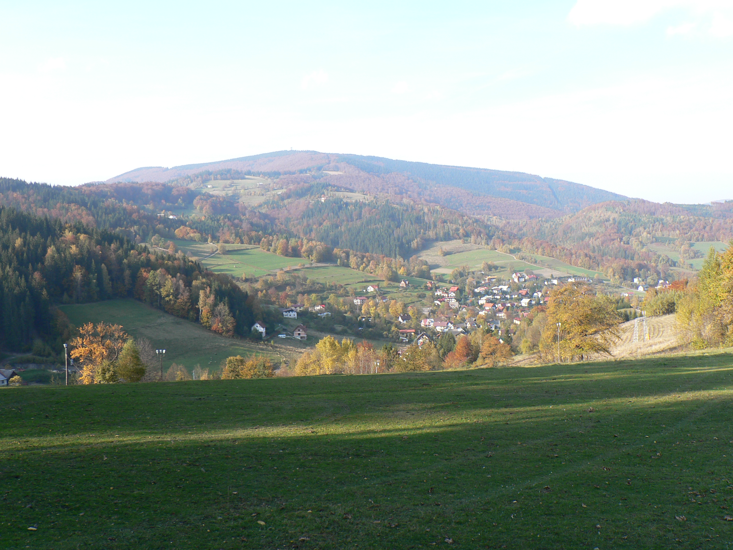 Wielka Czantoria i Wisła-Jawornik